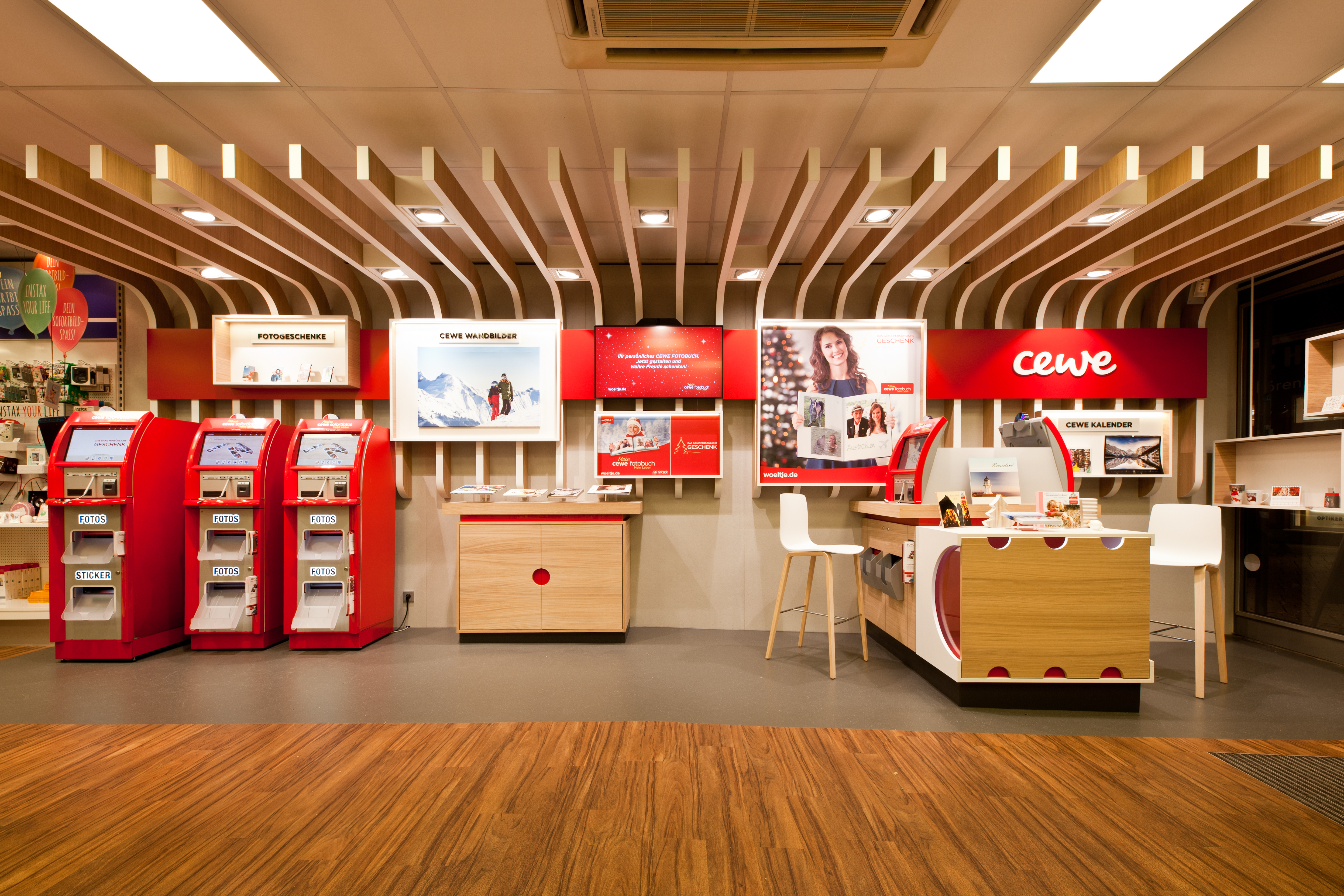 Das Wöltje Geschäft 2020, hier die CEWE Fotowelt